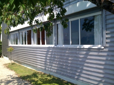 La fenêtre en bande de la Villa Le Lac de Le Corbusier à Corseaux (Suisse). Longueur 11 m. Préfiguration de celles de la Villa Savoye à Poissy.